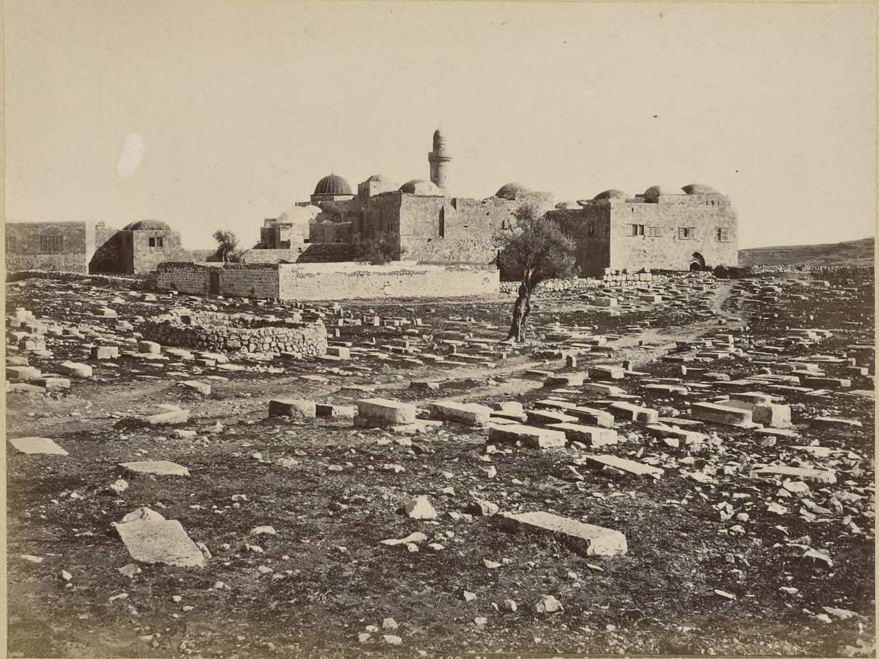 Tombeau de David et Cénacle, Jérusalem (Please provide the title of the work)[1], Souvenirs d'Orient : album pittoresque des sites, villes et ruines les plus remarquables de la Terre-Sainte edition, A Alais (Gard) : Chez l'auteur, 1878